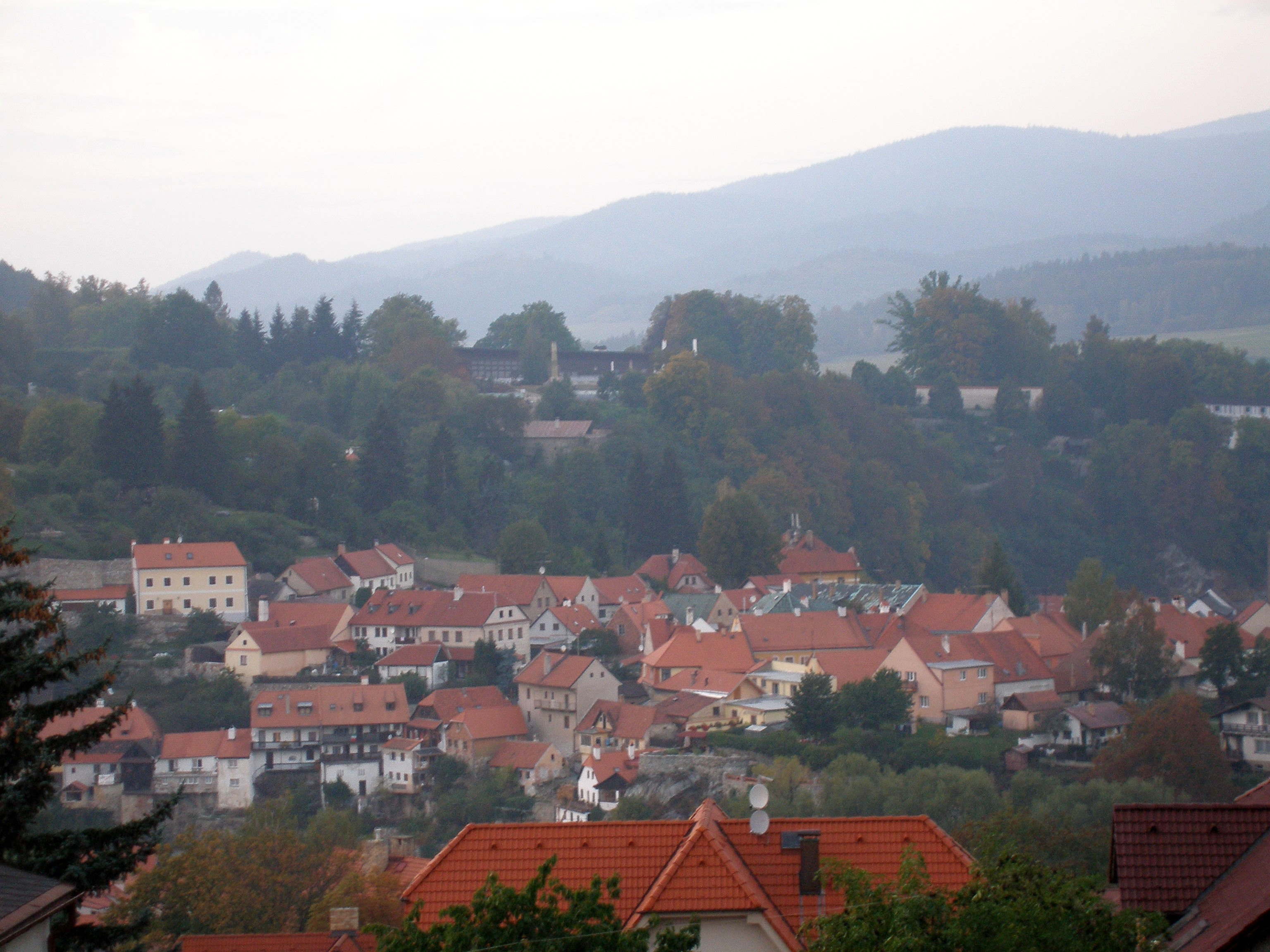 Český Krumlov - Pohled na část předměstí Plešivec z Křížového vrchu